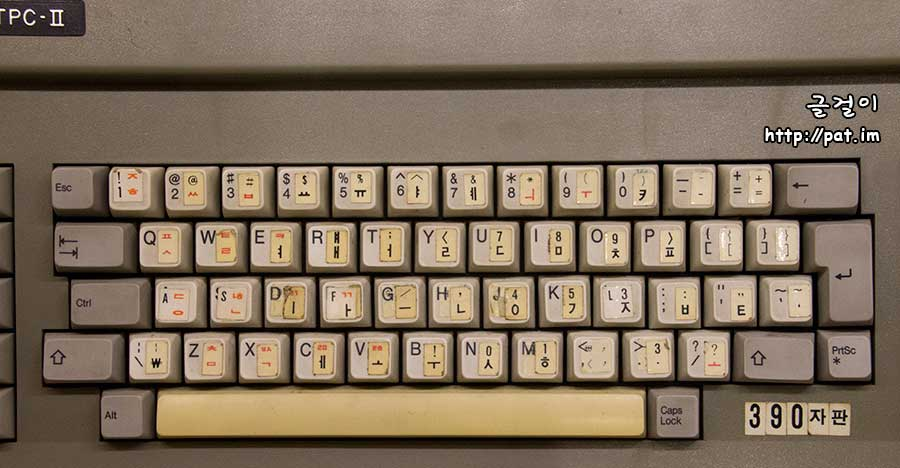 사진 출처 : 국립한글박물관 기획전 『디지털 세상의 새 이름_코드명 D55C AE00』에서 본 한글 자판 ( 전시물 소장자 : 공영태 (공안과 원장) ※ 반각형 딱지가 주로 붙어 있음 ※ 1, A, S, F 자리에는 전각형 딱지가 섞임 ※ 쉼표(,) 자리와 L 자리에 다른 배열(3-89, 3-91 등)의 것으로 보이는 딱지가 들어감